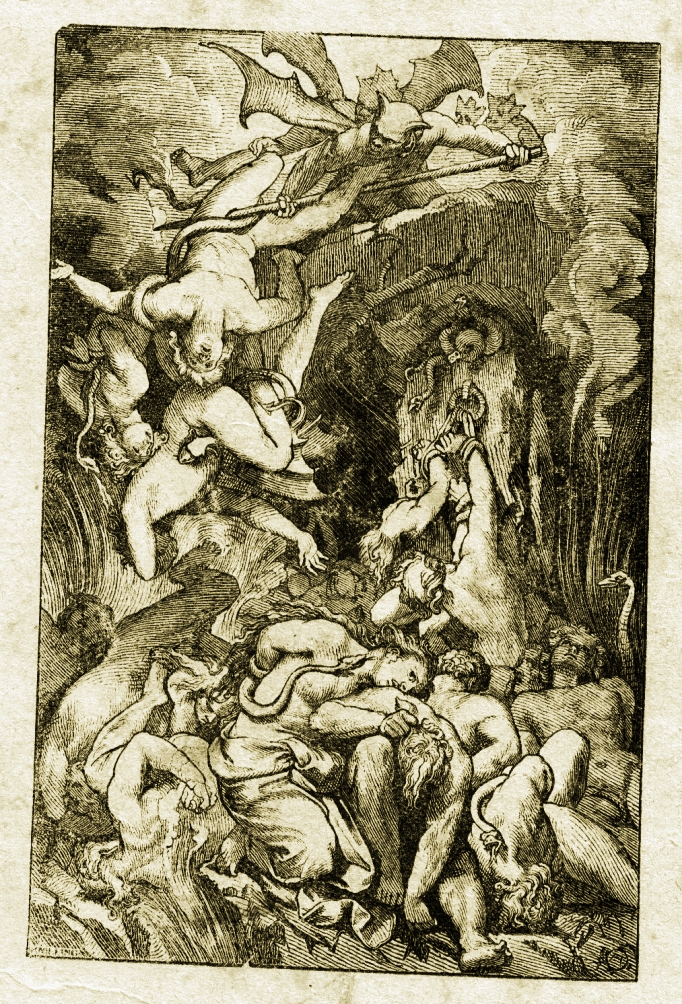 "Potępienie". Rycinia ze schrobenhausenowskiego warsztatu Carla Poellath